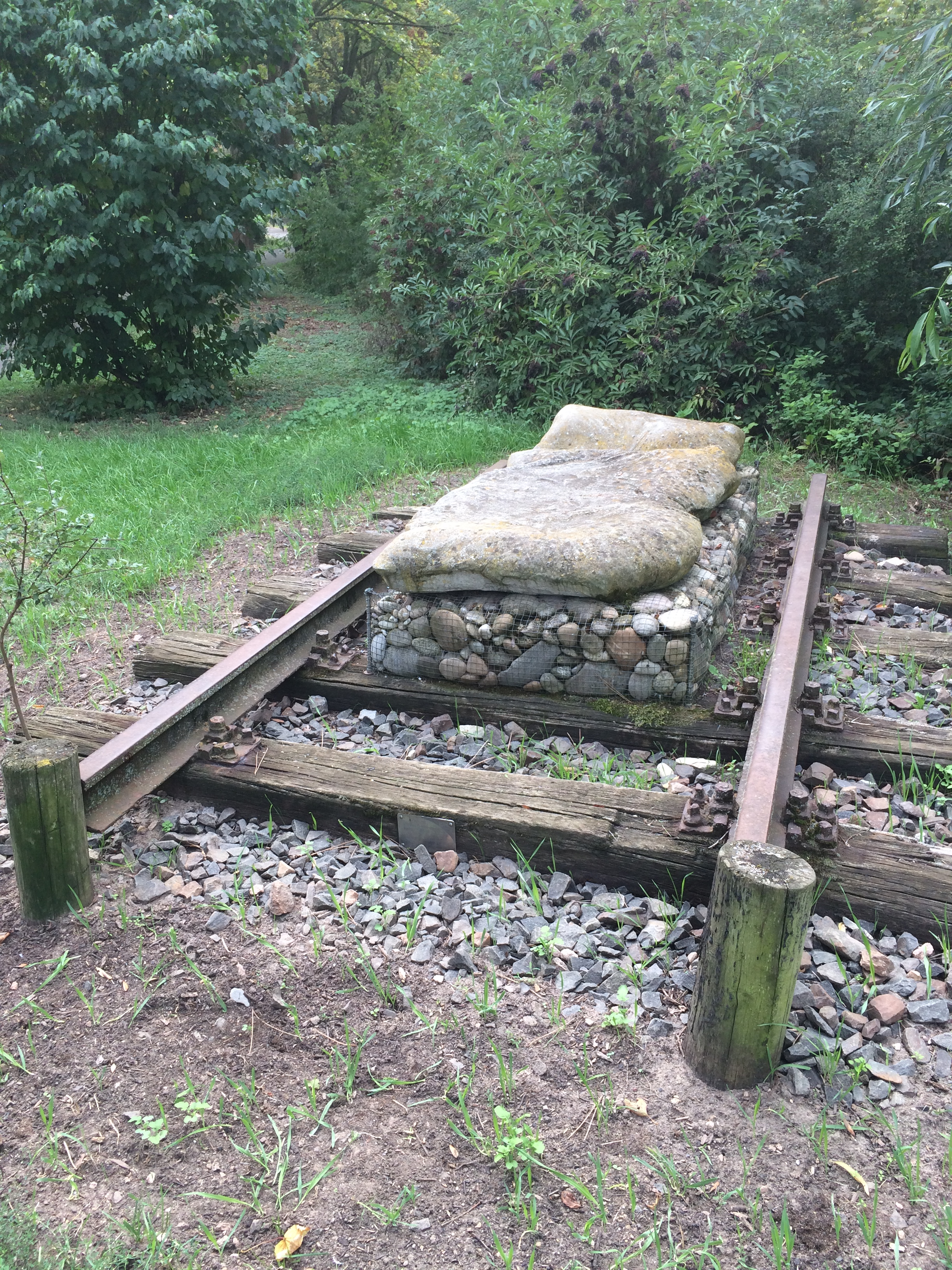 Gleis Amiche